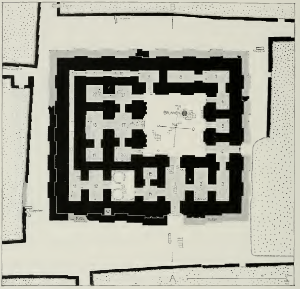 Plan du temple d'Ishtar d'Akkad dégagé à Babylone dans le quartier du Merkès.